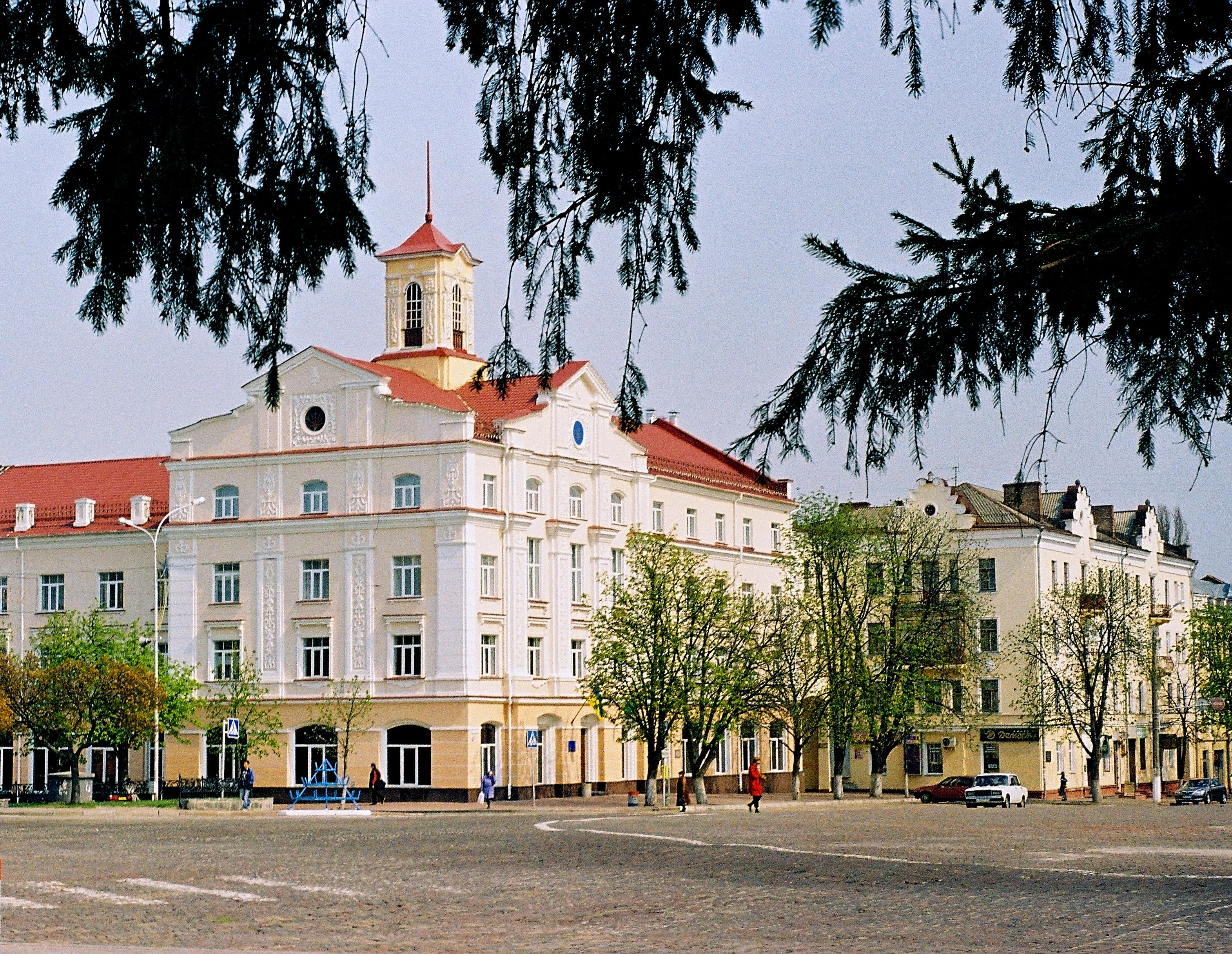 Адміністративний будинок, Чернігів, вул. Гетьмана Полуботка, 2